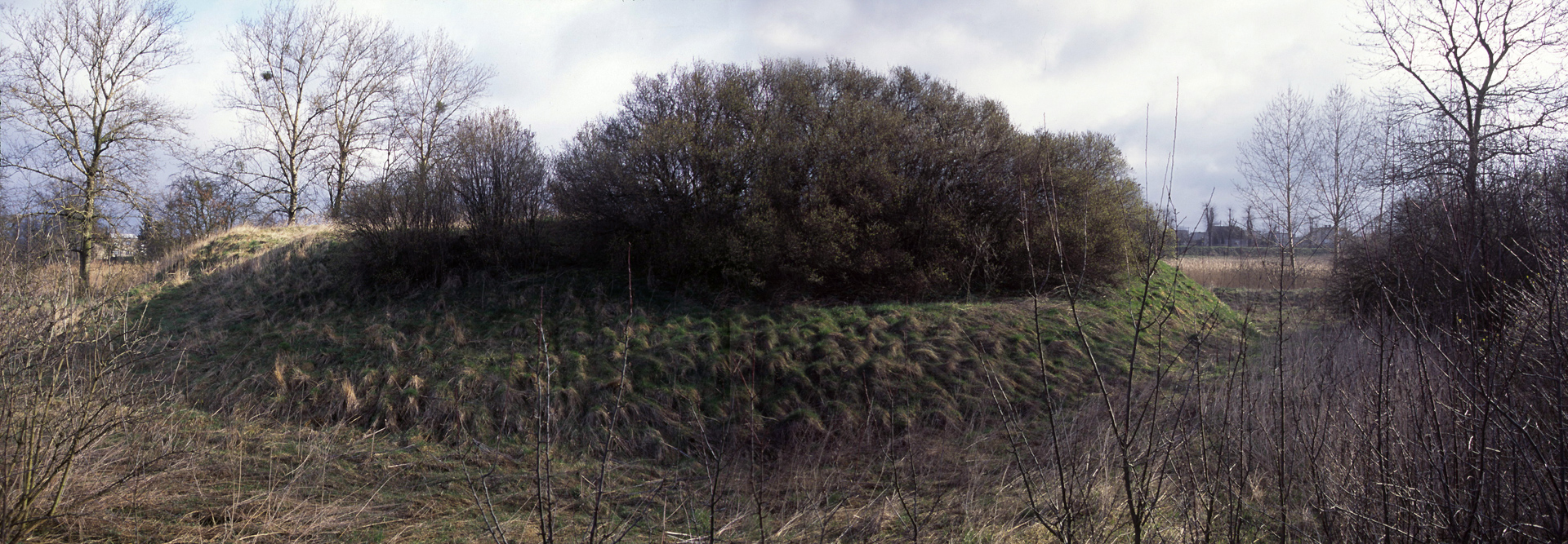 pozostałości zamku (grodzisko), Ostroróg, Ostroróg